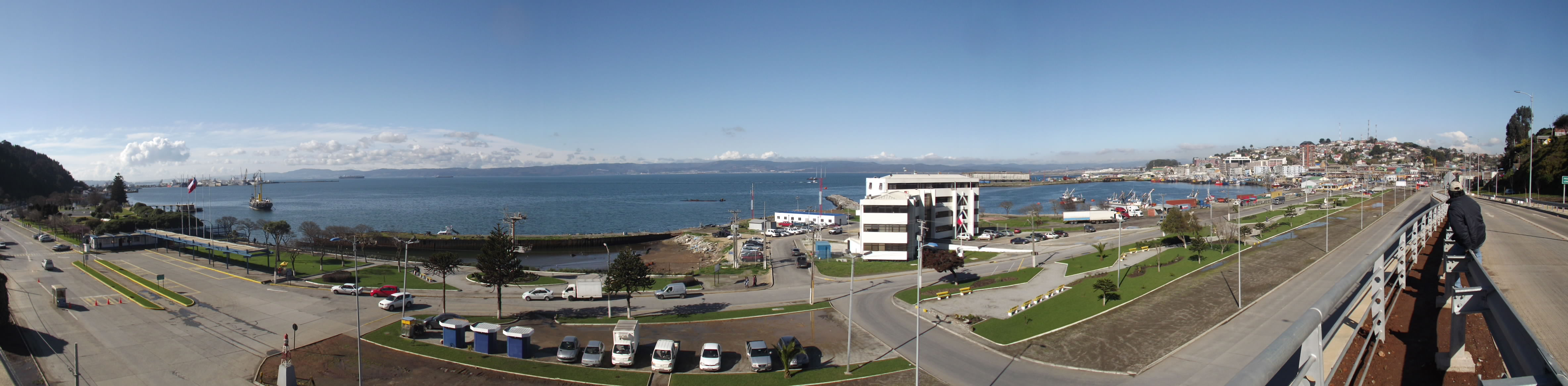 Panoramica del Puerto de Talcahuano en el cual se ve a la derecha de la imagen la Ciudad y al otro lado la Puerta los Leones de la Armada. Donde está el famoso Huascar